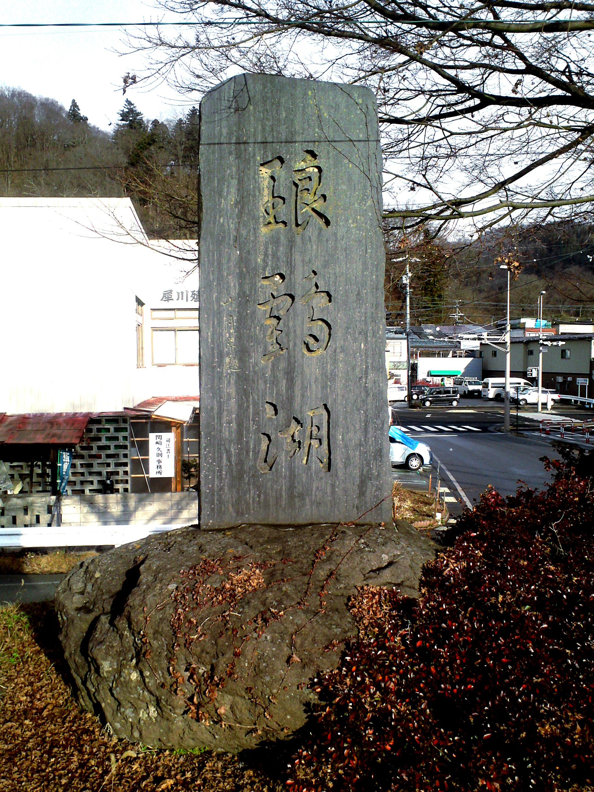 有島生馬により命名された「琅鶴湖」を記念する石碑。